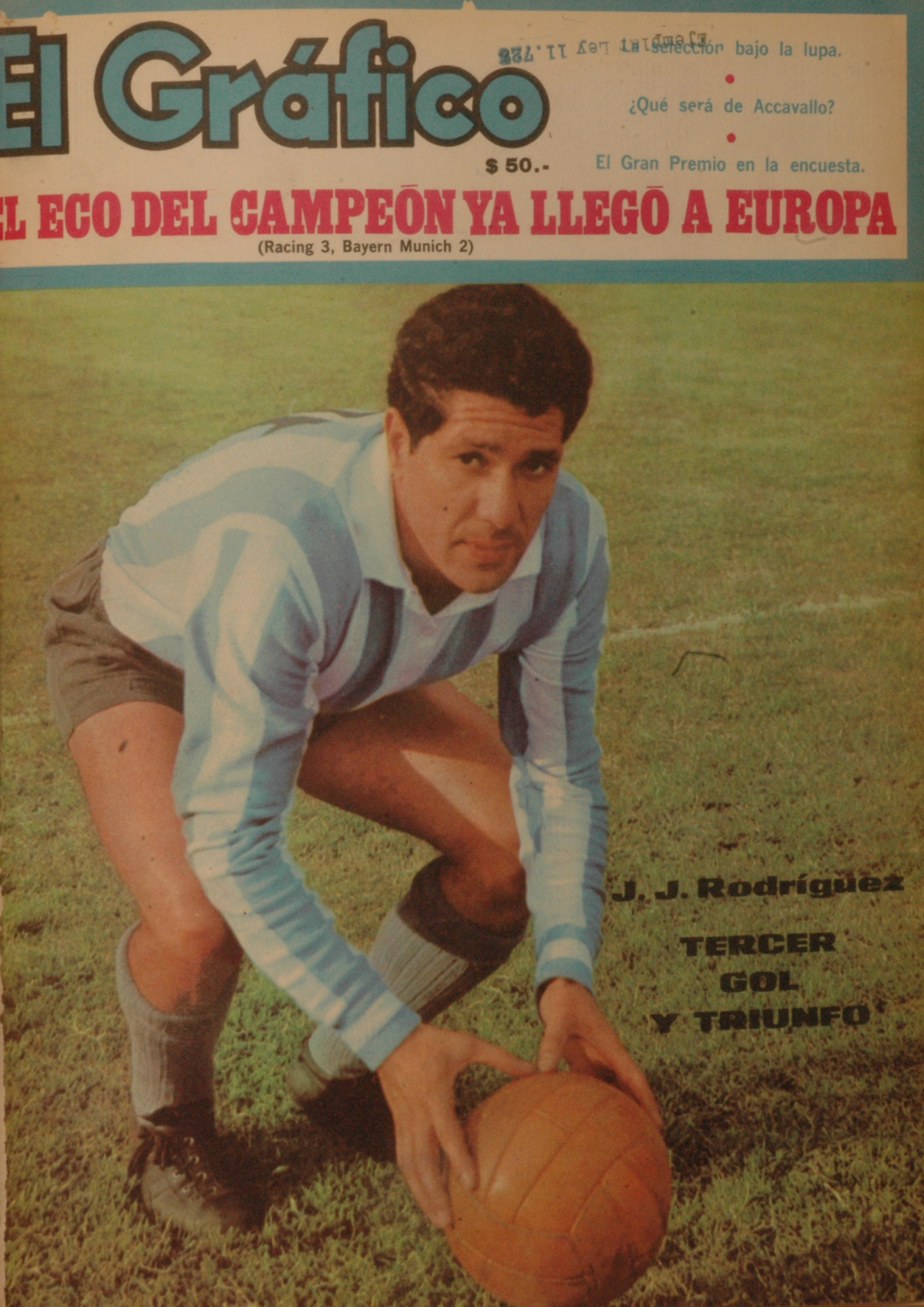 El Grafico del 27 de Diciembre de 1966. Edicion 2464